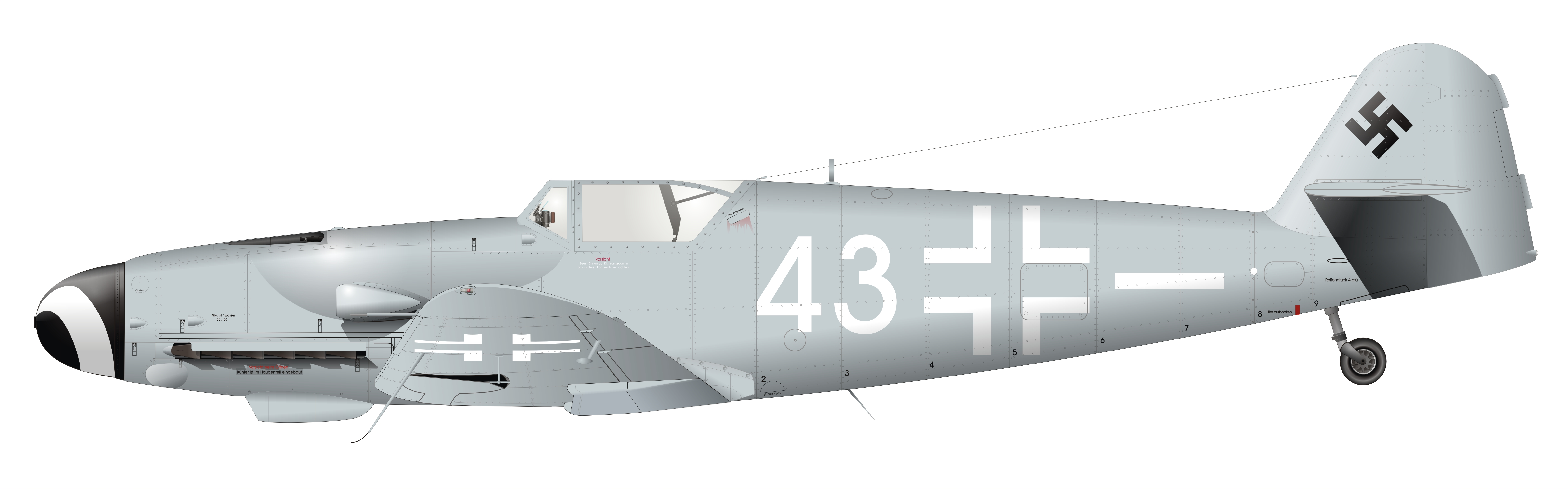 Bf 109 G-10, JG 3 "Udet", Eskortflugzeug für Sturmbockstaffeln